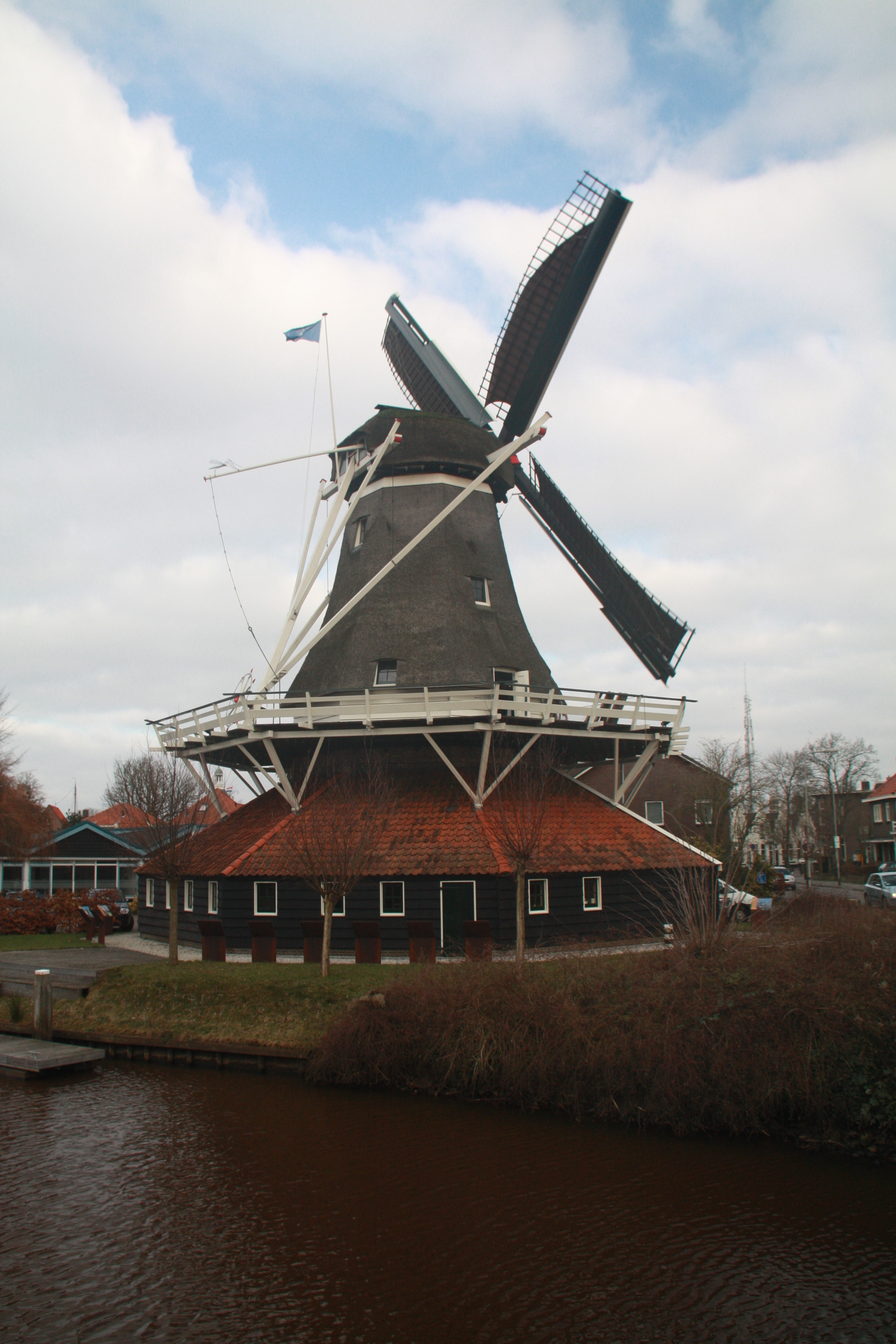 De Weert